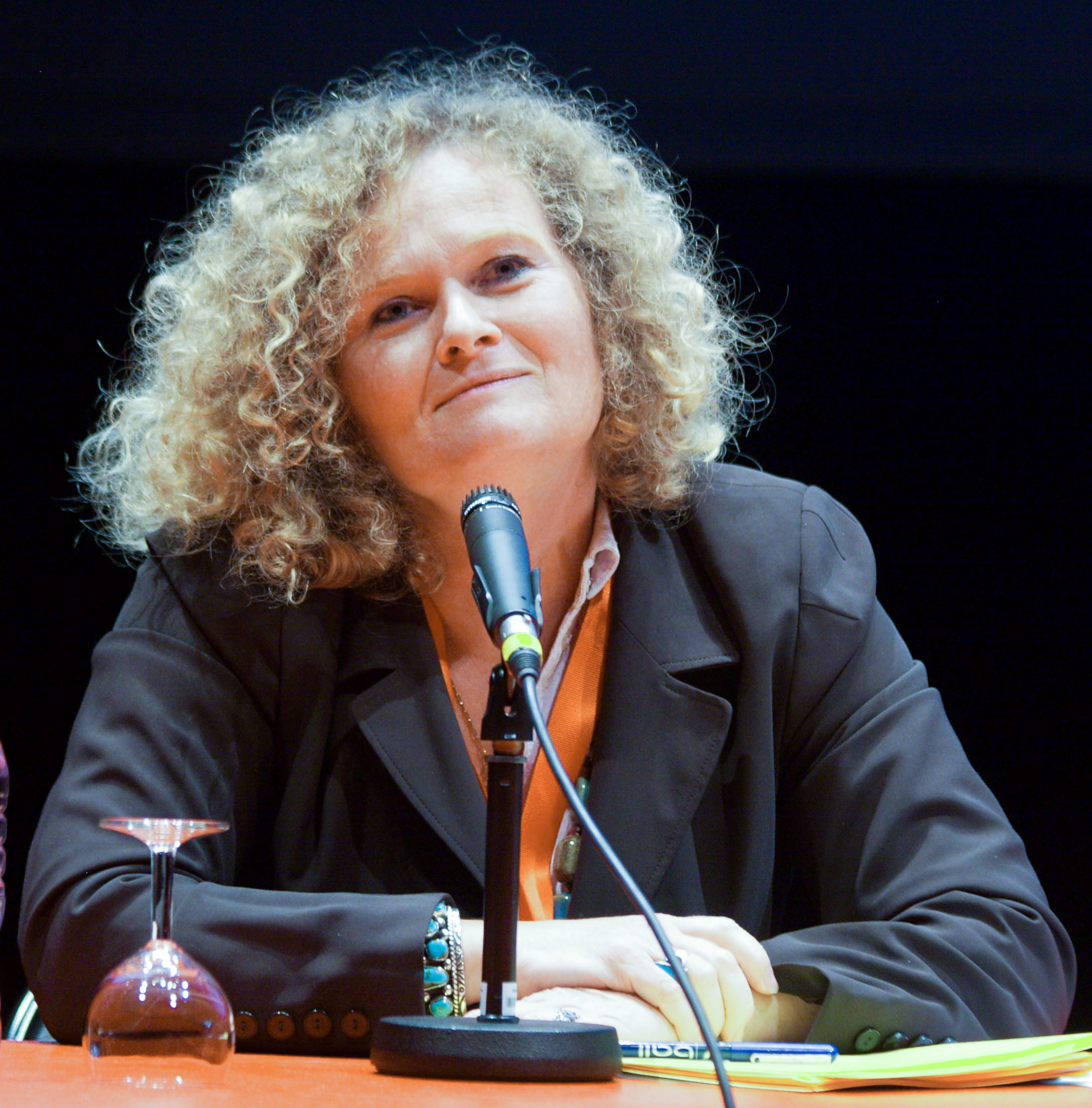 Sylvie Brunel au forum Libération 2008